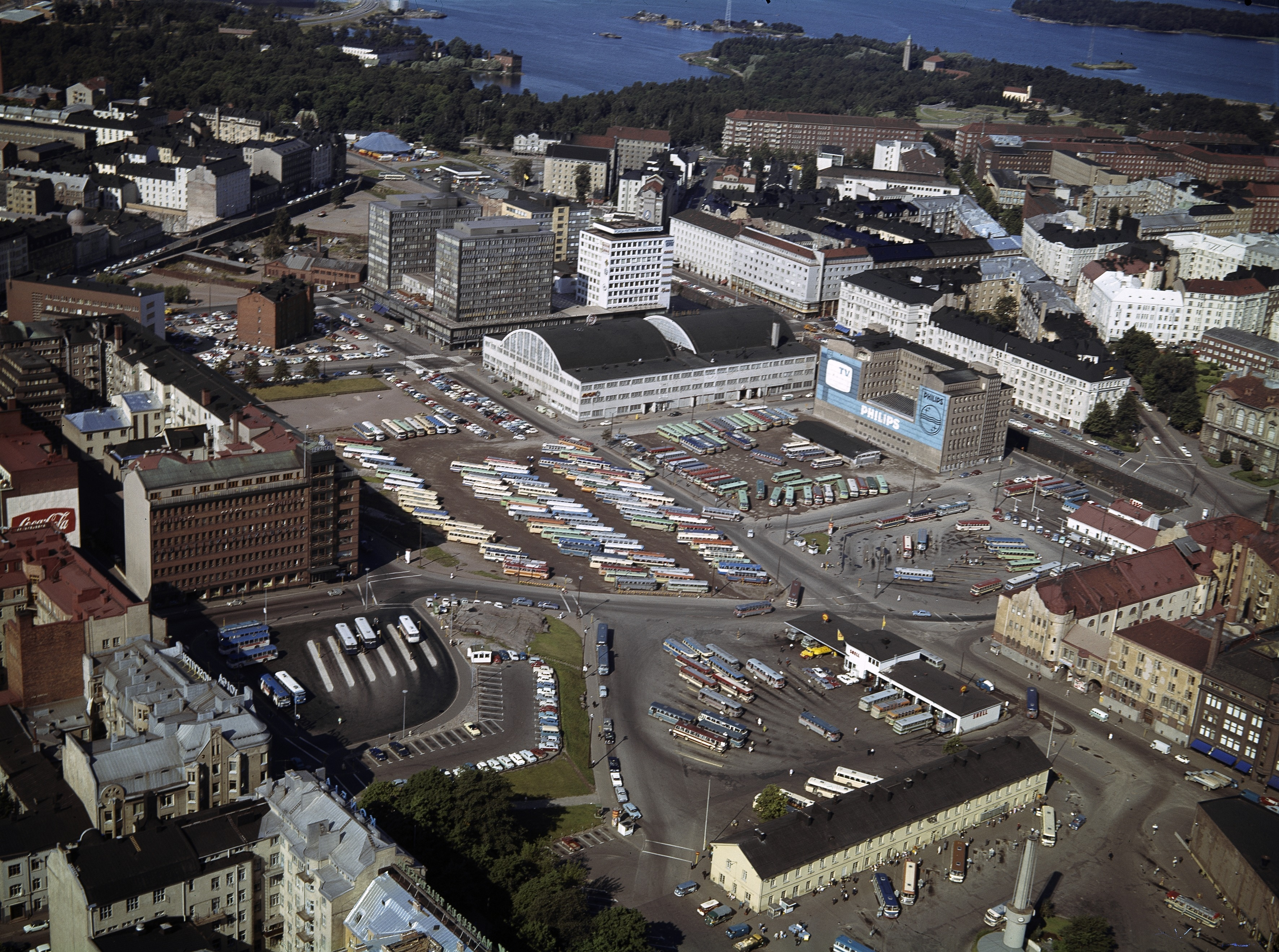 Kampin linja-autoasema ilmakuvassa.